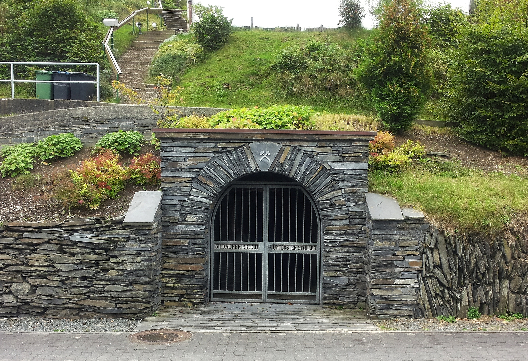 Silbacher Bruch, Unterster Stollen Silbach, Germany